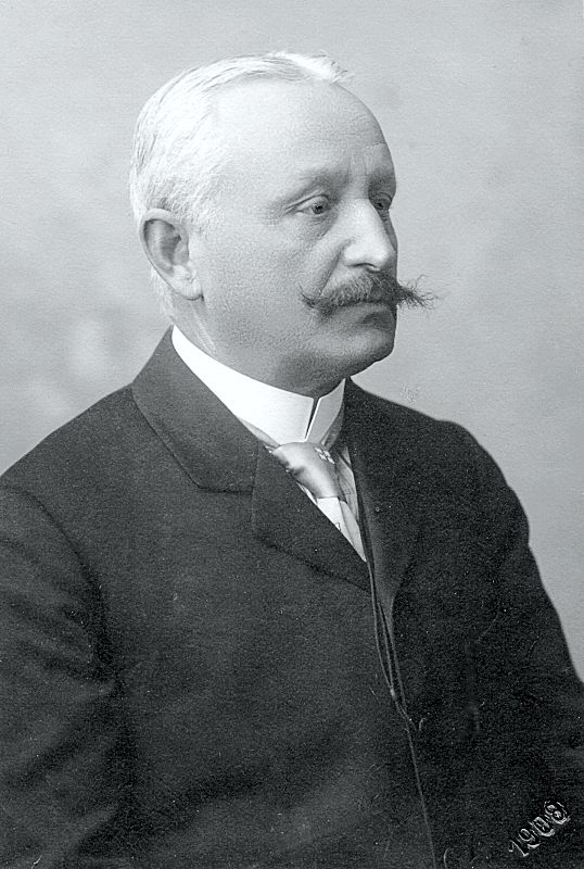 Wilhelm Ernst Dietl, Graz 1908